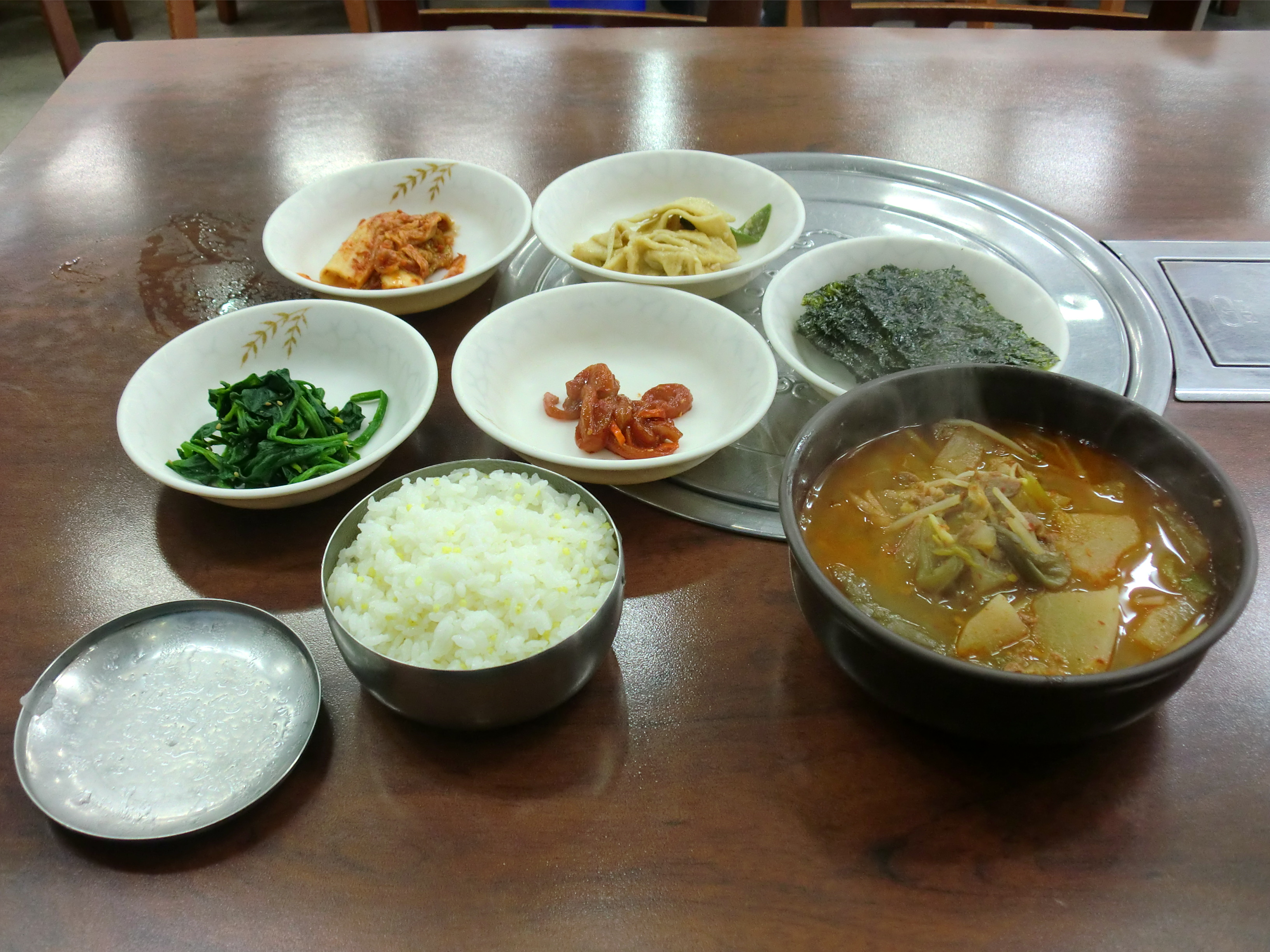 대구에서 먹은 따로국밥